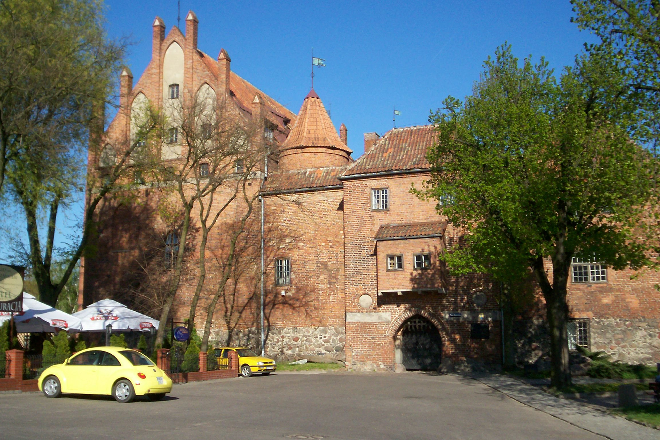 Kętrzyn, Plac Zamkowy 1 - zamek krzyżacki, XIV, XX w.